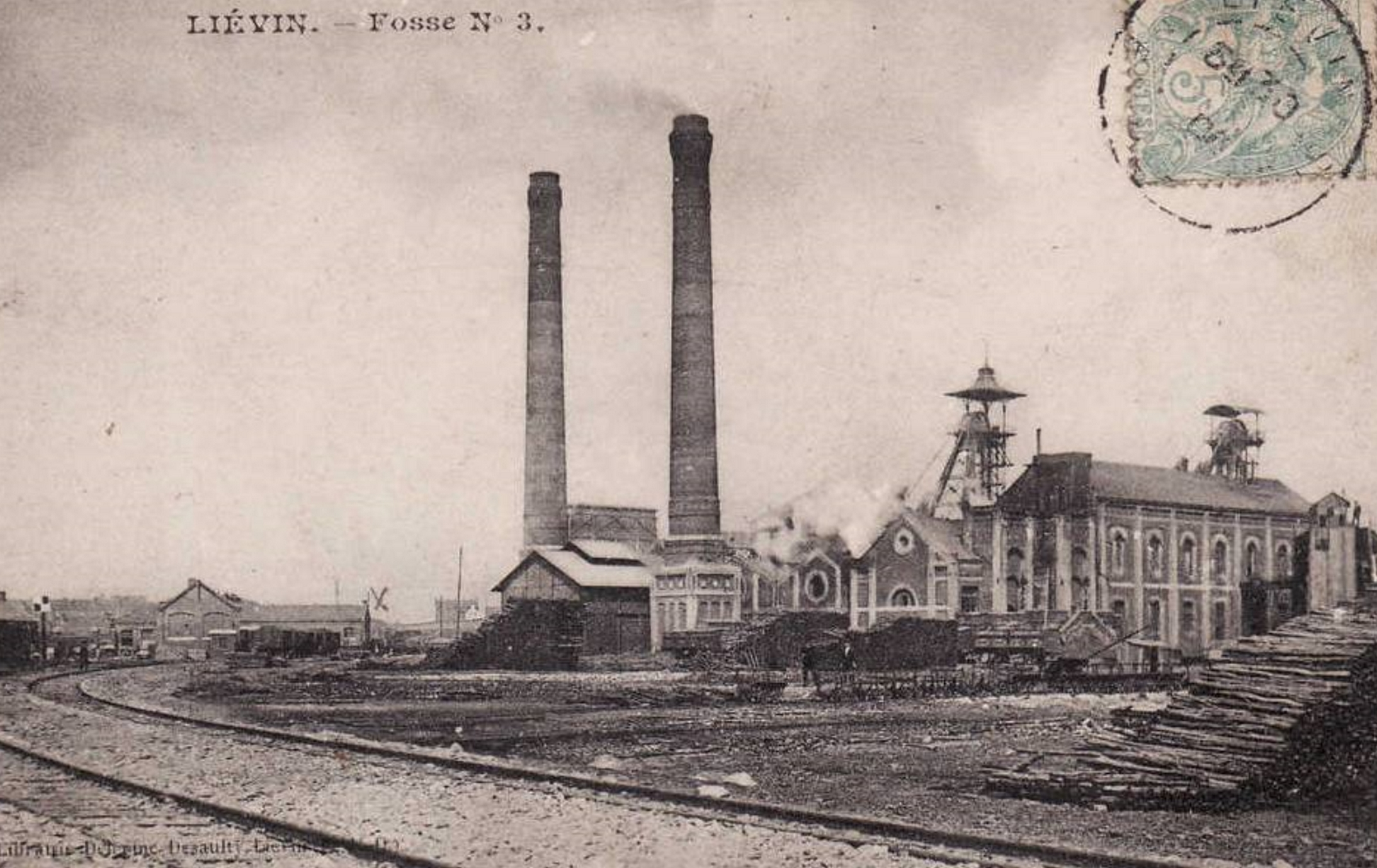 Fosse n° 3 - 3 bis - 3 ter de la Compagnie des mines de Liévin, Éleu-dit-Leauwette, Pas-de-Calais, Nord-Pas-de-Calais, France.